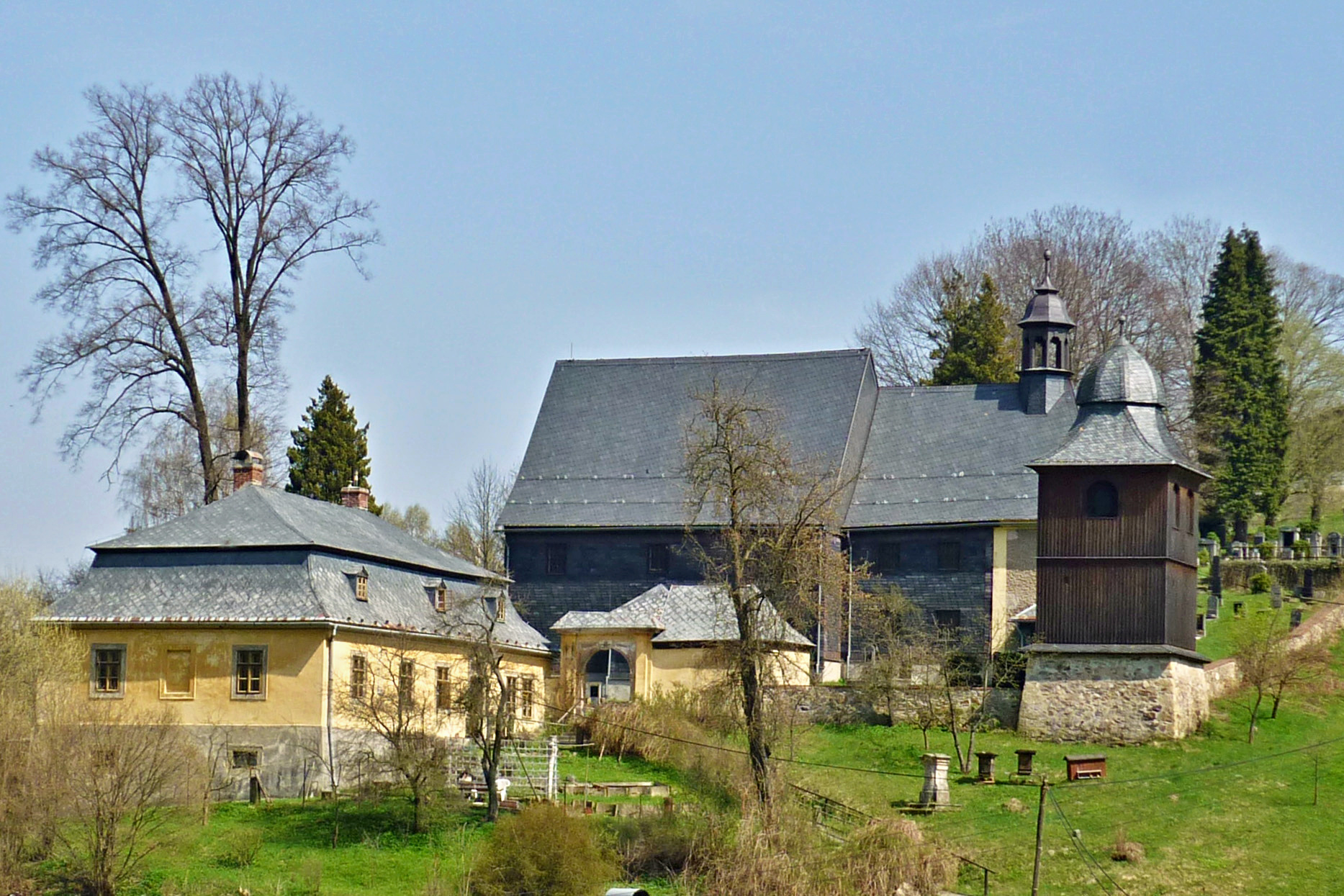 Holzkirche St. Christophorus in Christofsgrund (Kryštofovo Údolí) in Nordböhmen